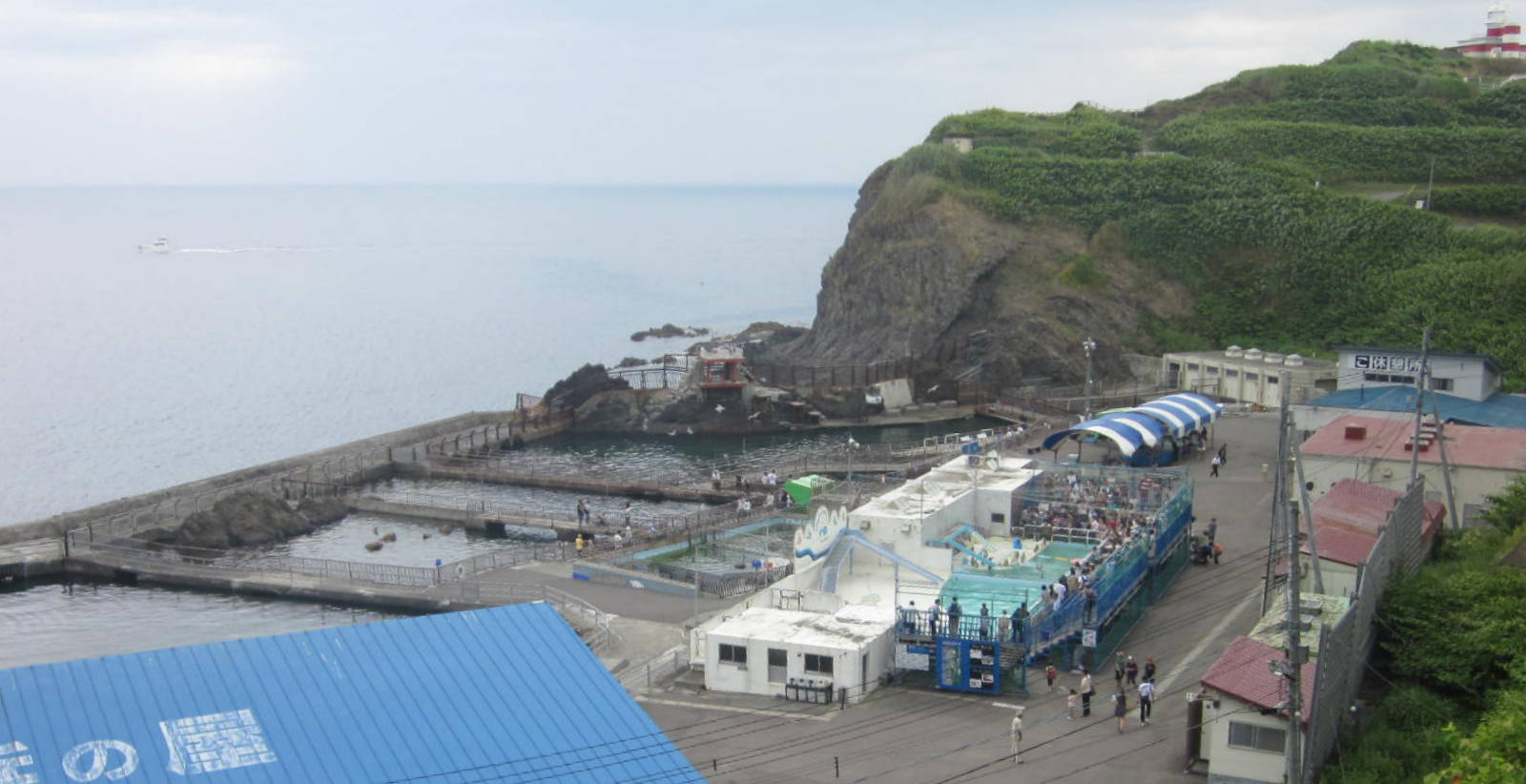 おたる水族館 海獣公園